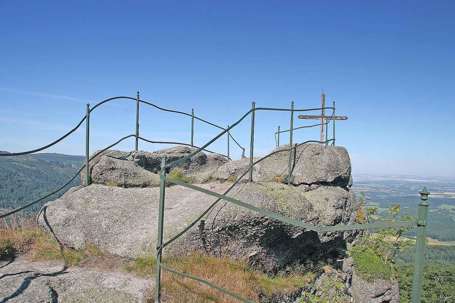 Paličník 944 m, Jizera Mountains, Czech Republic Autor:Prazak Date: 18. 7. 2006